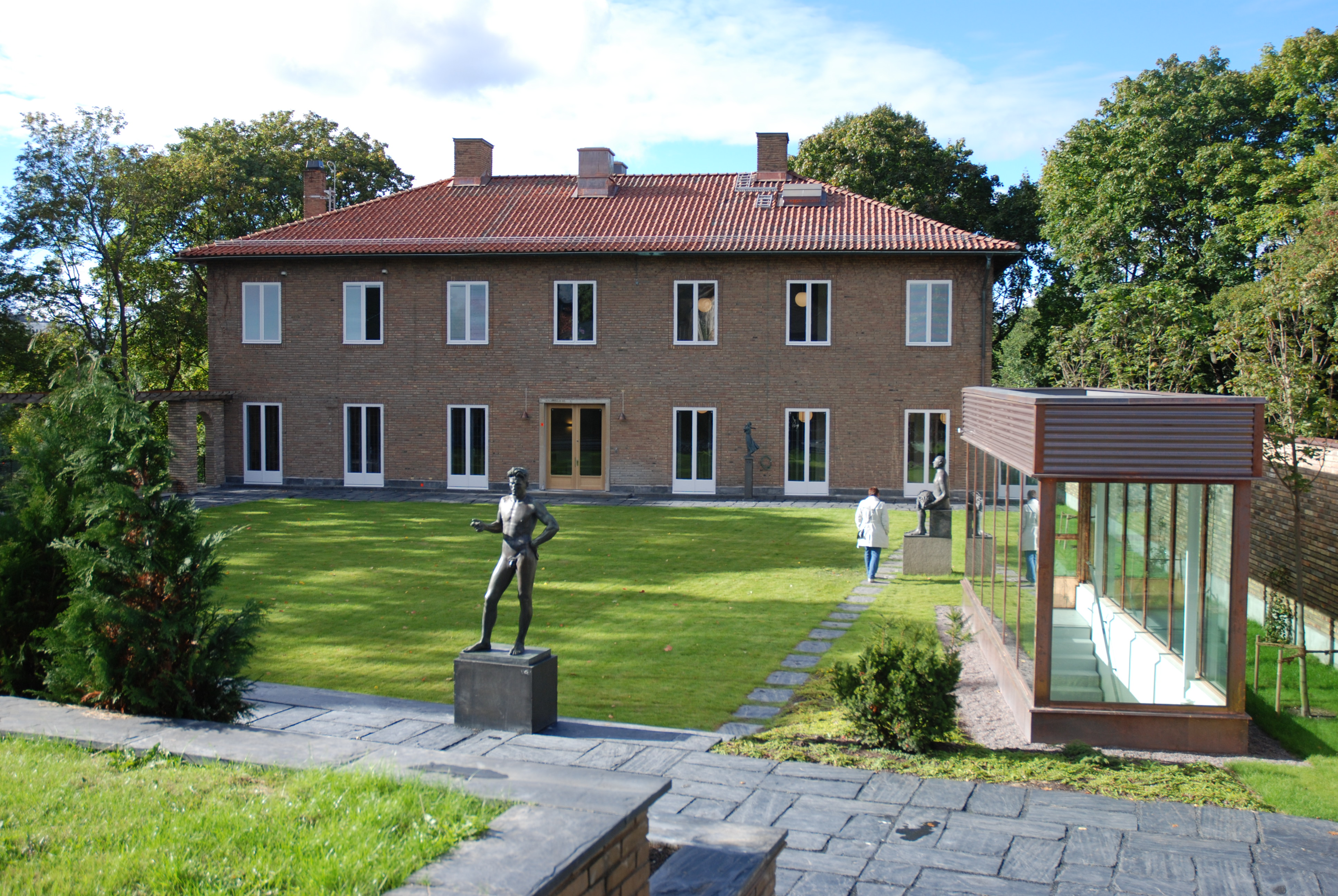 Marabouparken Art Exhibition Hall, Sundbyberg, Sweden